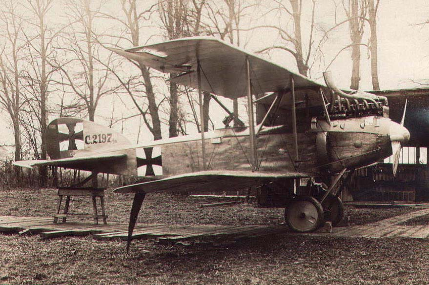 Albatros C.VII 2197/16